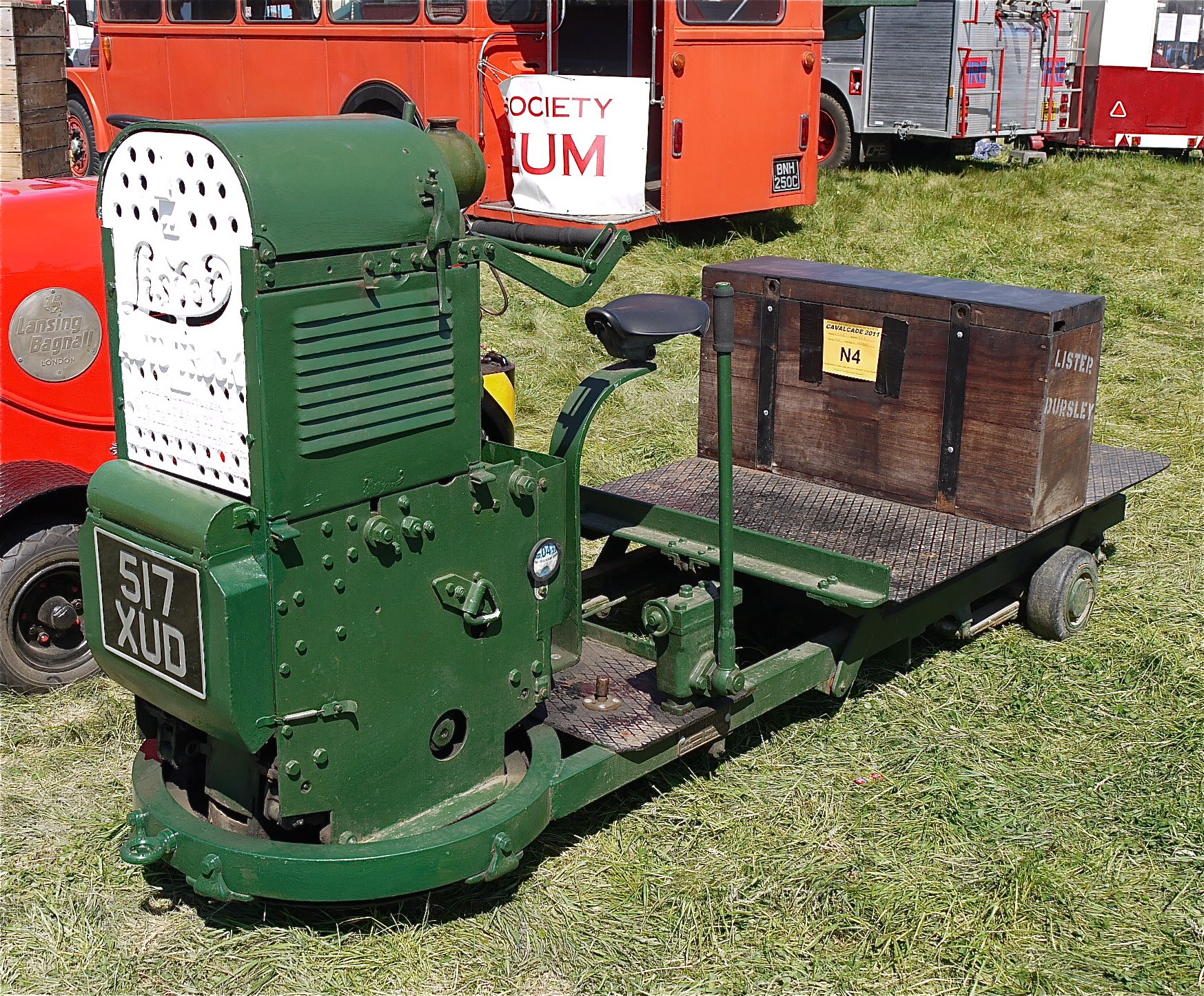 Panasonic G1 14-45 Lens